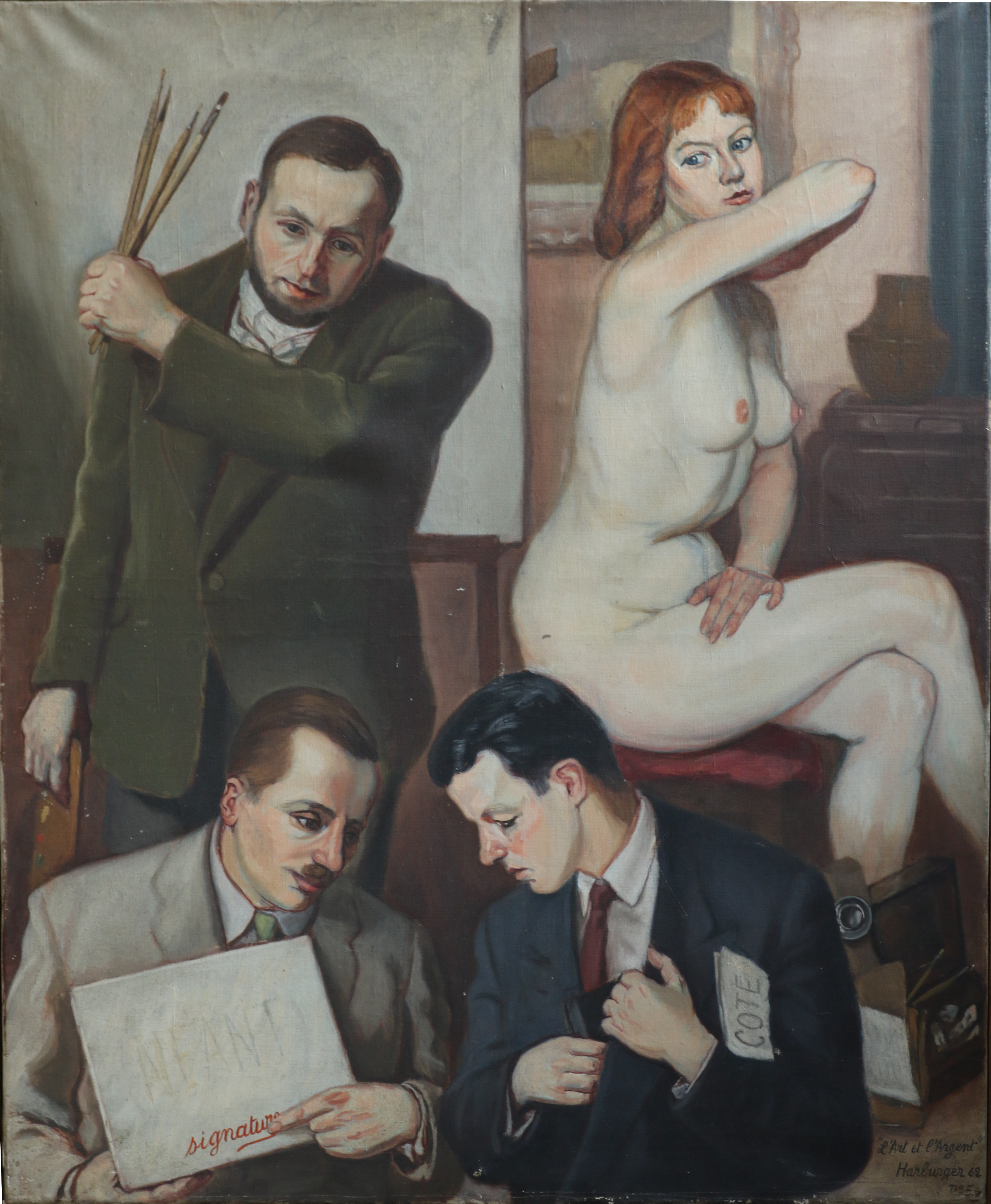 L'Art et l'Argent, 1962, 100 x 81 cm, par Francis Harburger